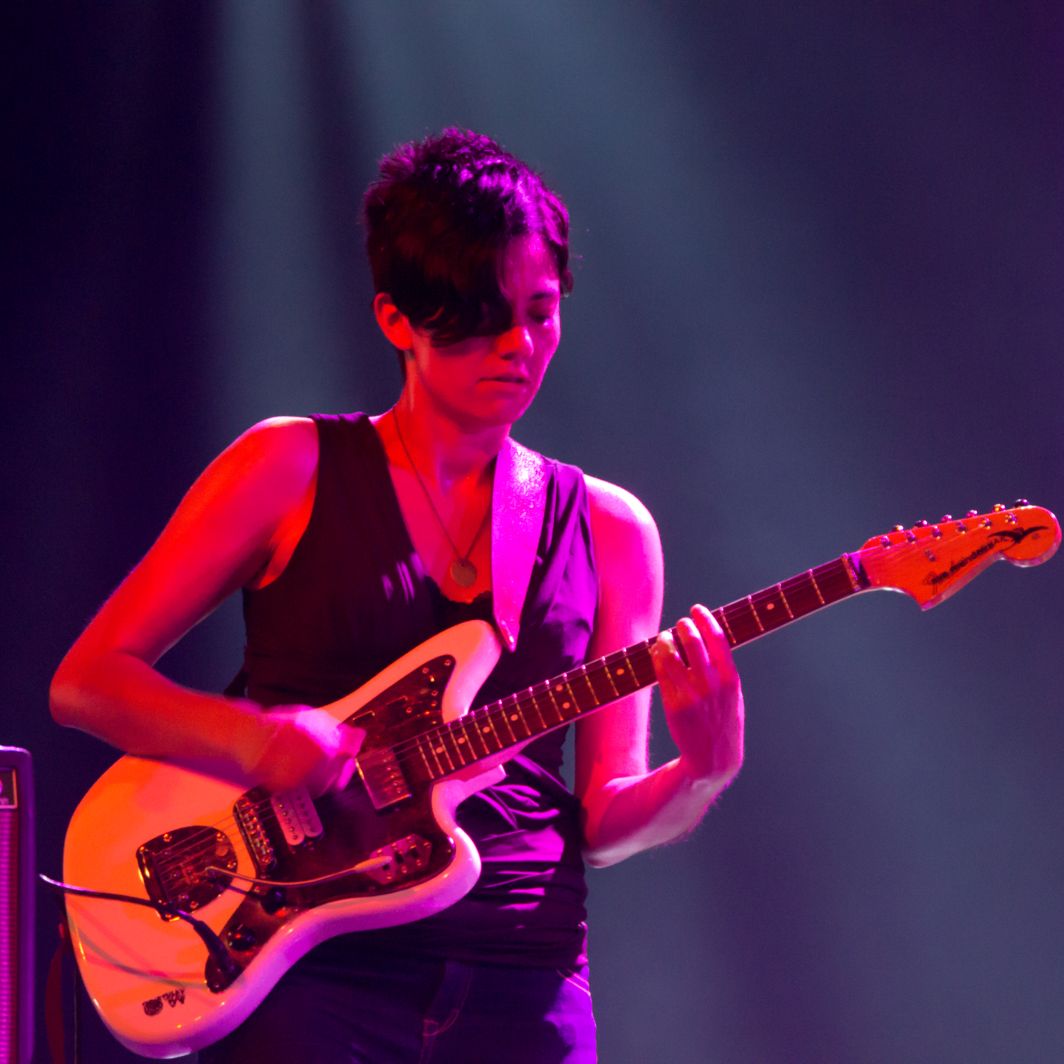 Ava Mendoza, amerikanische Jazzgitarristin